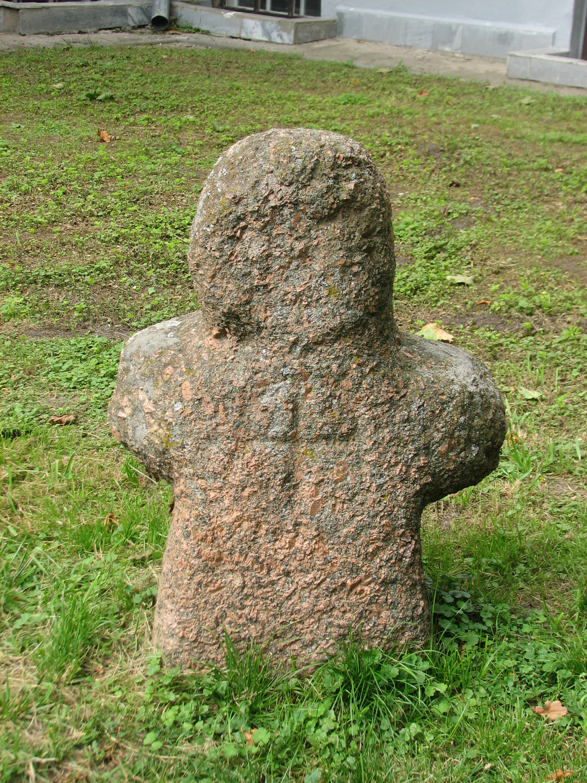 Беларуская (тарашкевіца): Каменны ідал зь вёскі Буцькі Пружанскага раёну. У 2000 перавезены ў Пружаны і ўсталяваны з усходняга боку Пружанскага палацыку